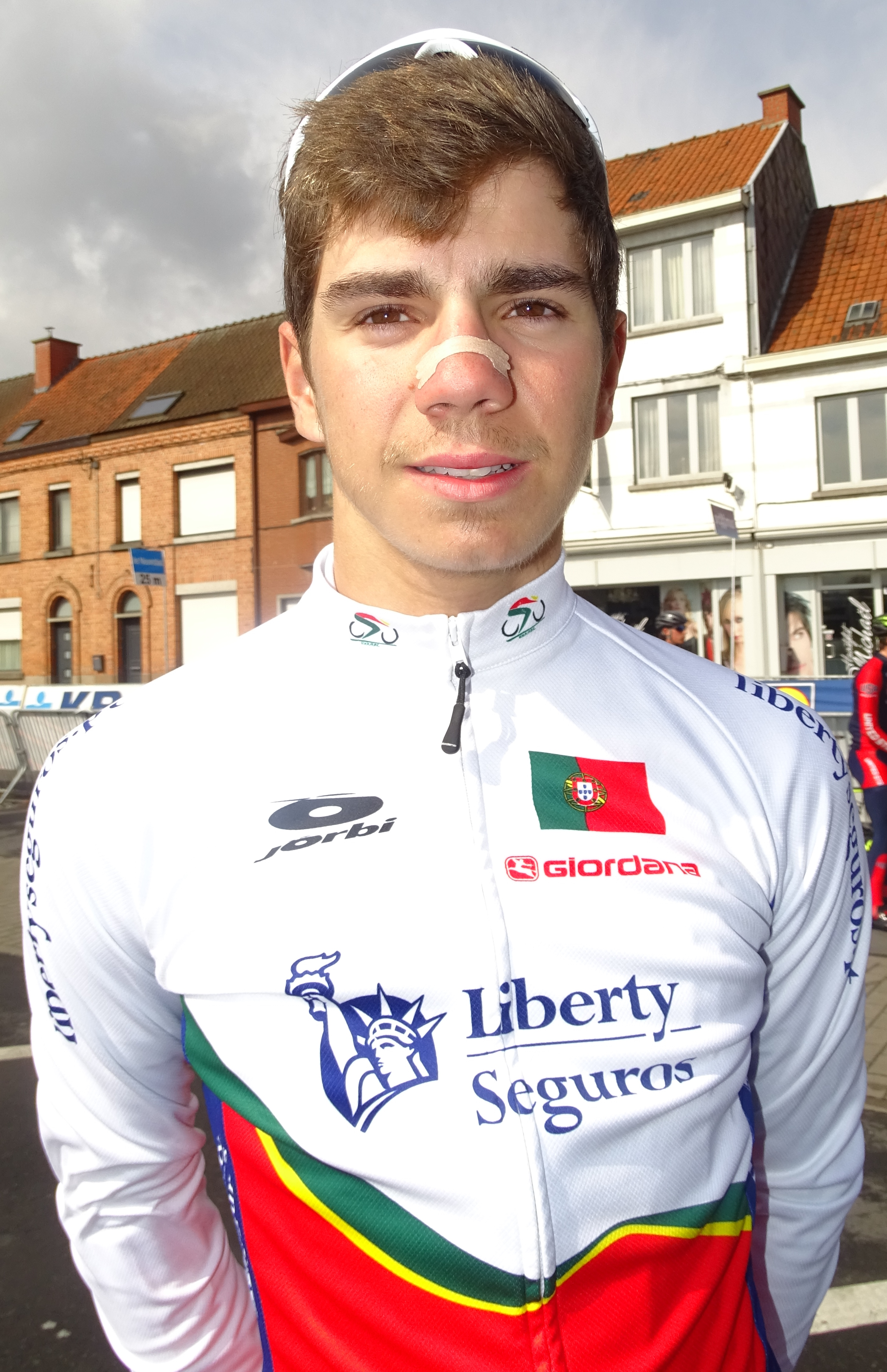 Reportage réalisé le samedi 11 avril à l'occasion du départ et de l'arrivée du Tour des Flandres espoirs 2015 à Audenarde, Belgique.